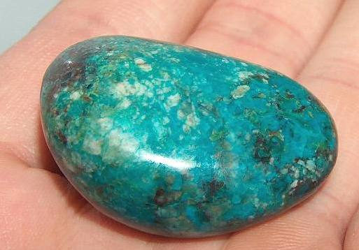 chryzokola, grudka polerowana, autor zdjęcia Grzegorz Framski.